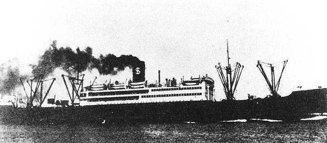 勝鬨丸